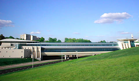 Kazan Metro Ametiyevo Station Outside станция "Аметьево" (снаружи) метро Казани